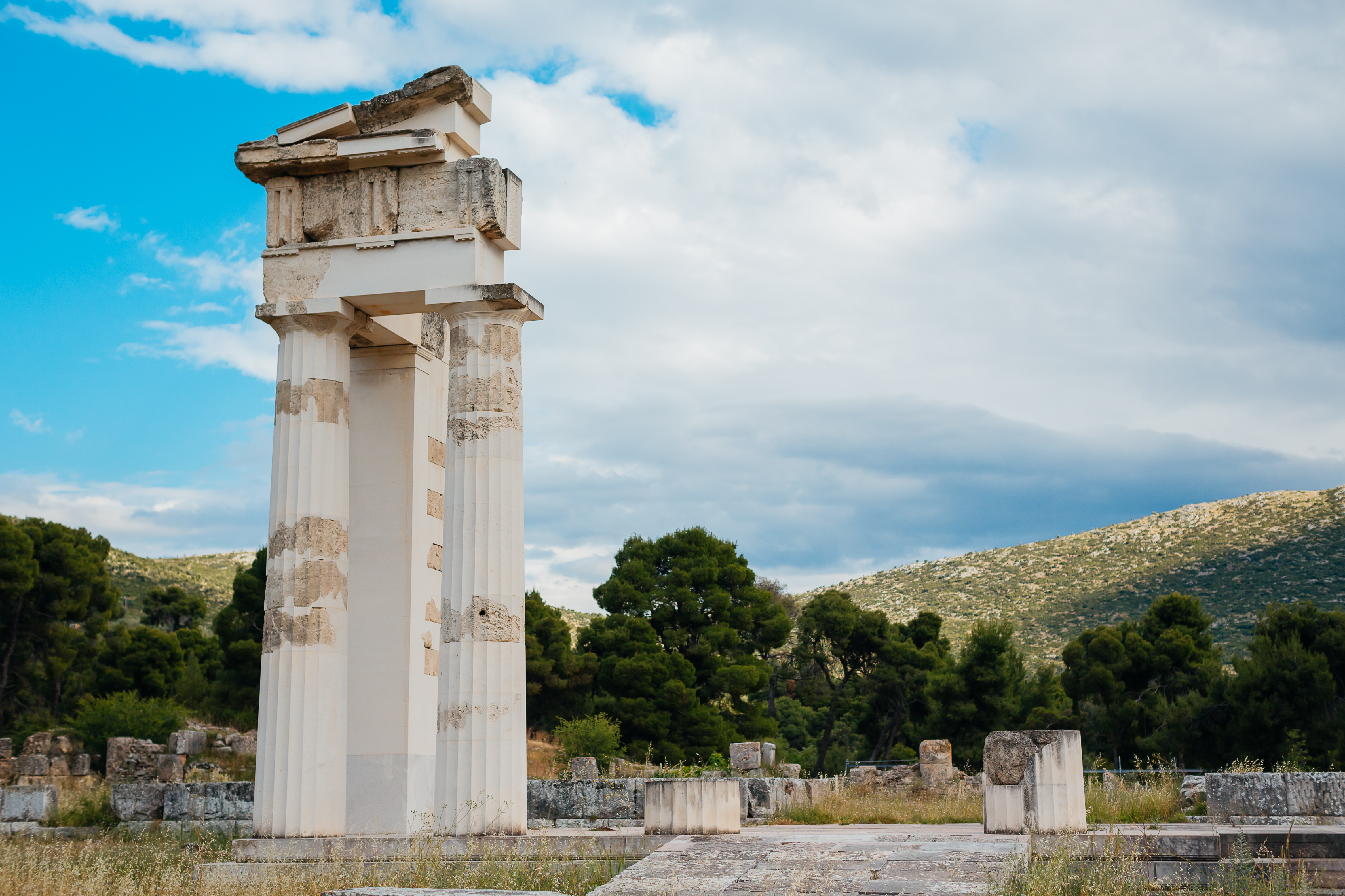 Асклепион, май 2016